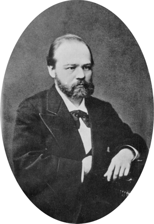 фото известного русского физика Дмитрия Александровича Лачинова